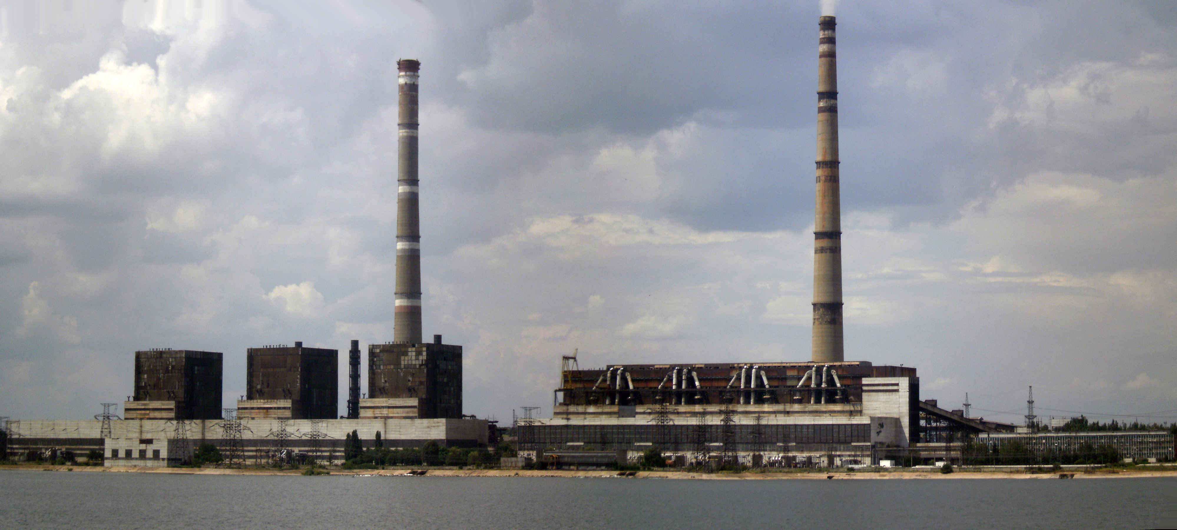 г. Светлодарск, Донецкая